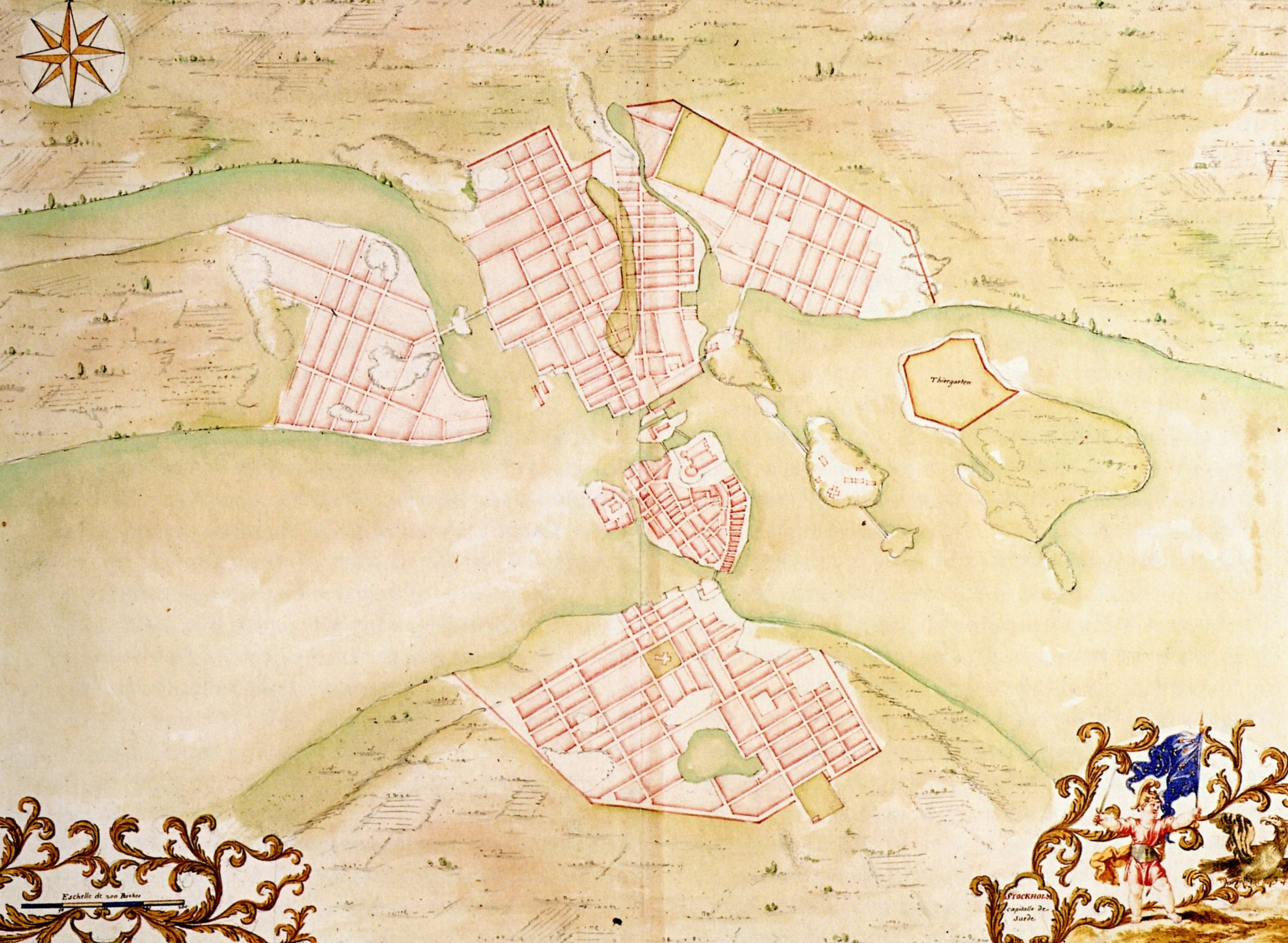 Utändsk Stockholmskarata med titeln "Stockholm Cappitale de Suède" från omkring 1650